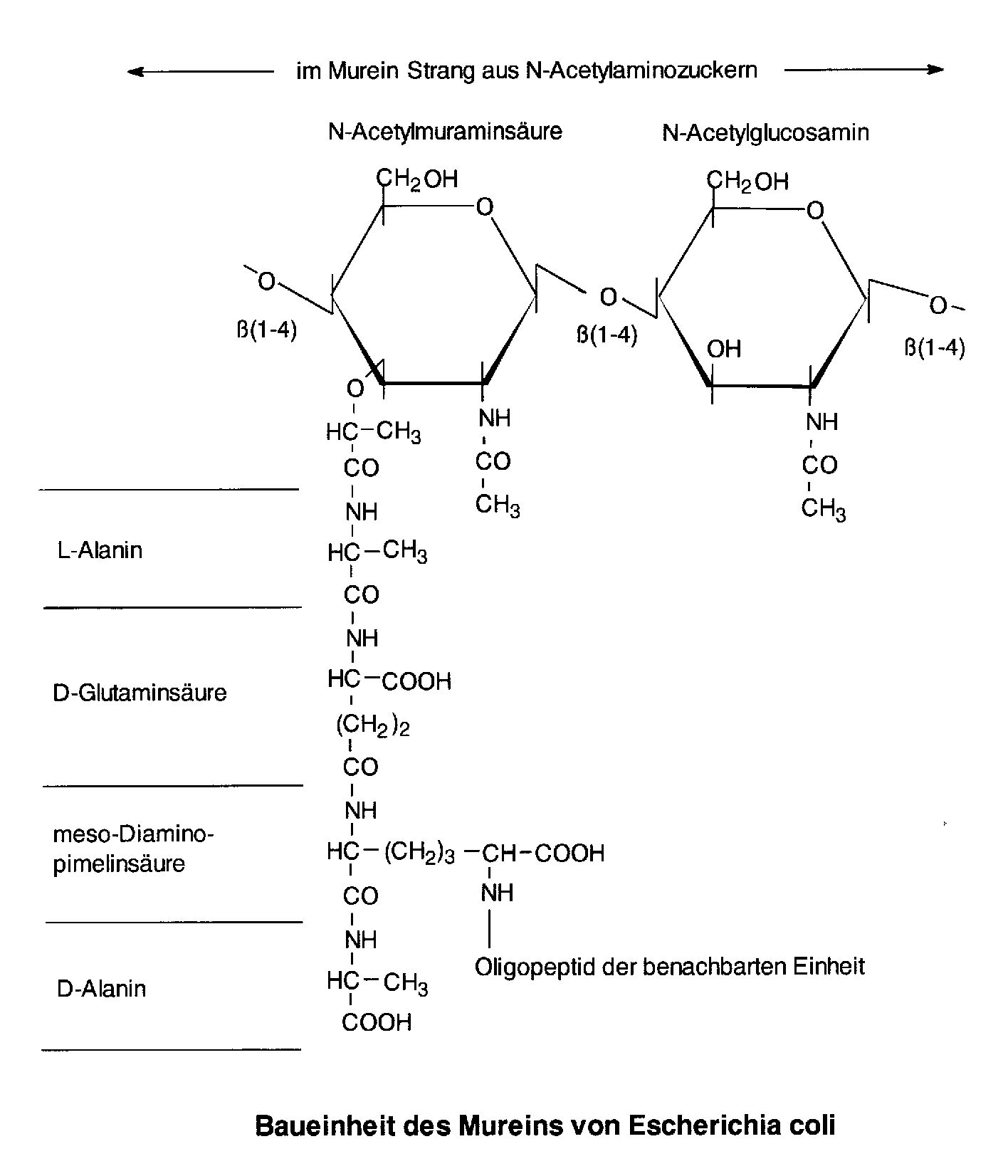 Murein-Baueinheit von Escherichia coli